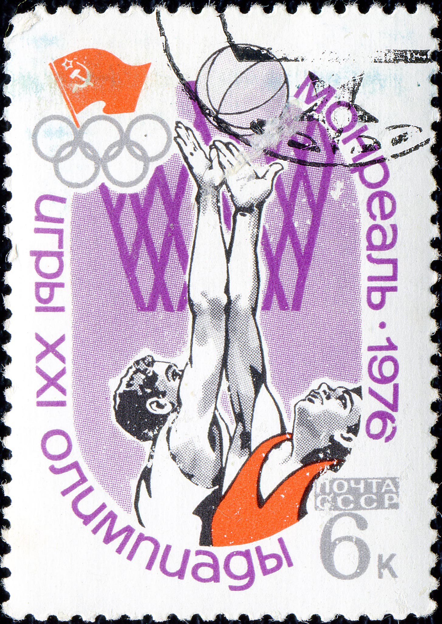 Почтовая марка СССР. 1976. XXI Летние Олимпийские игры. Баскетбол